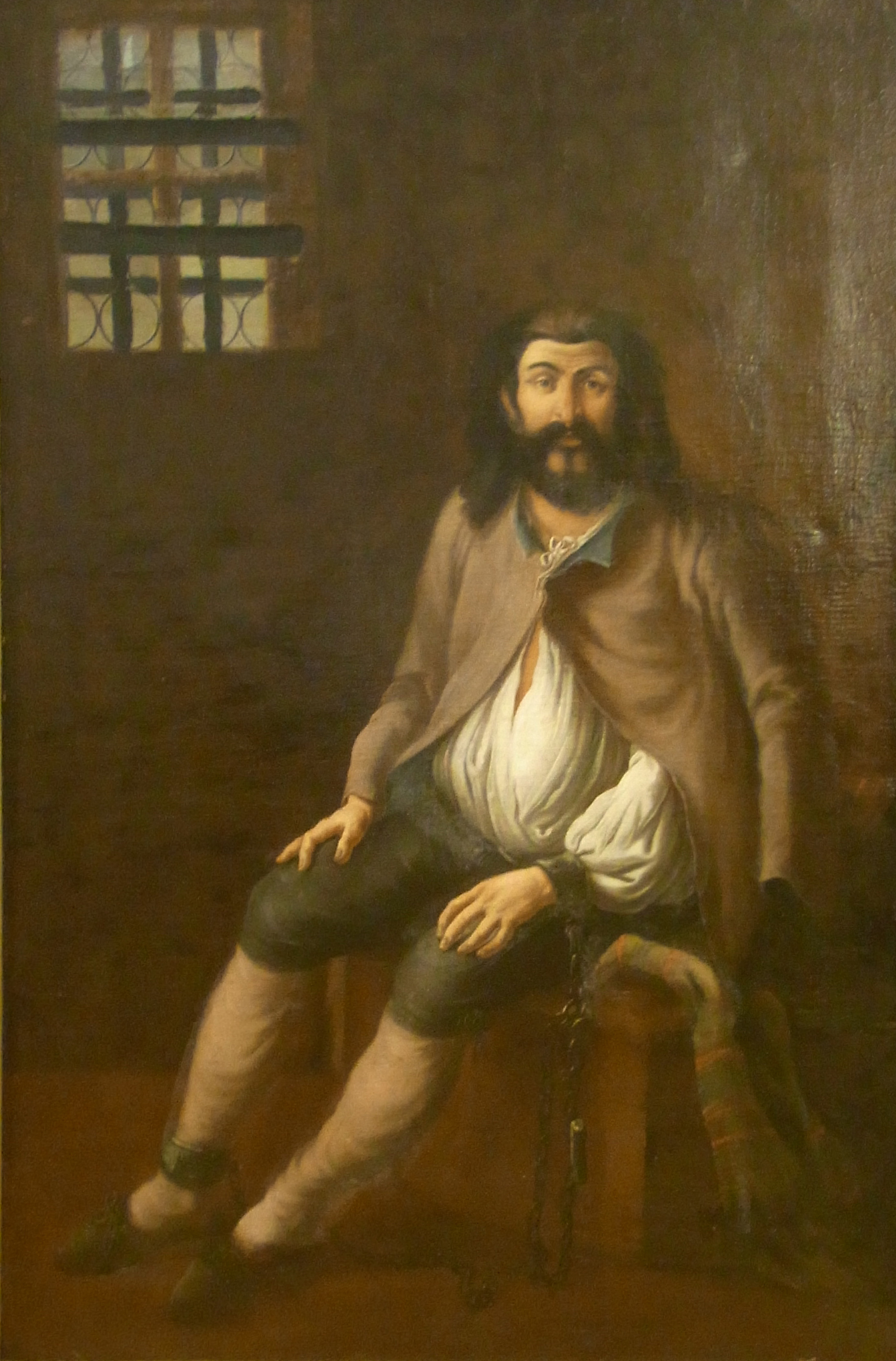 Hannikel im Gefängnis Ölgemälde